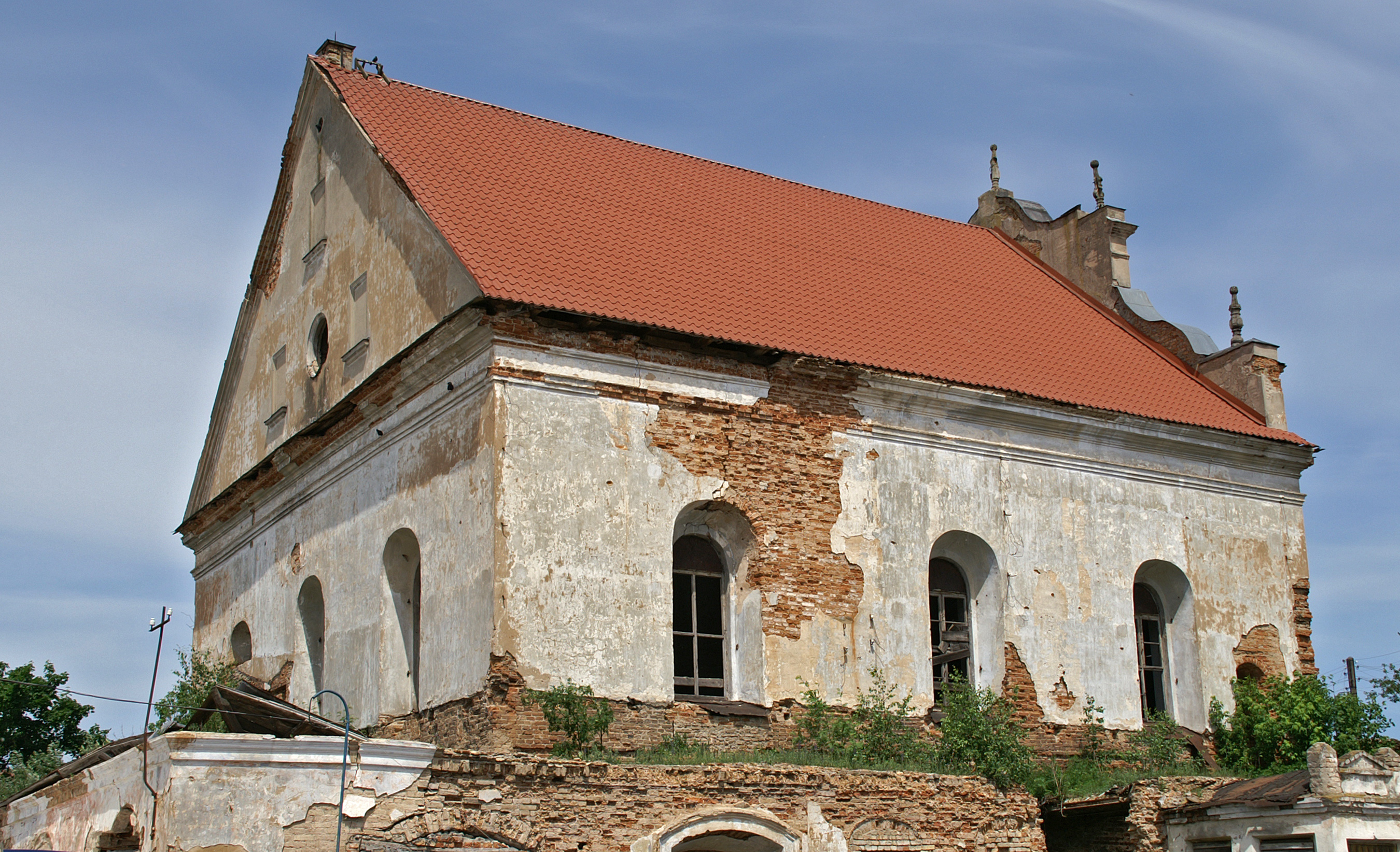 Беларуская (тарашкевіца): Будынак былой сынагогідэкаратыўнае аздабленьне:фрэскавыя кампазыцыі, арнамэнтальная лепка. г. Слонім This is a photo of Belarusian heritage monument. Reference number: 412Г000509 ( WLM)